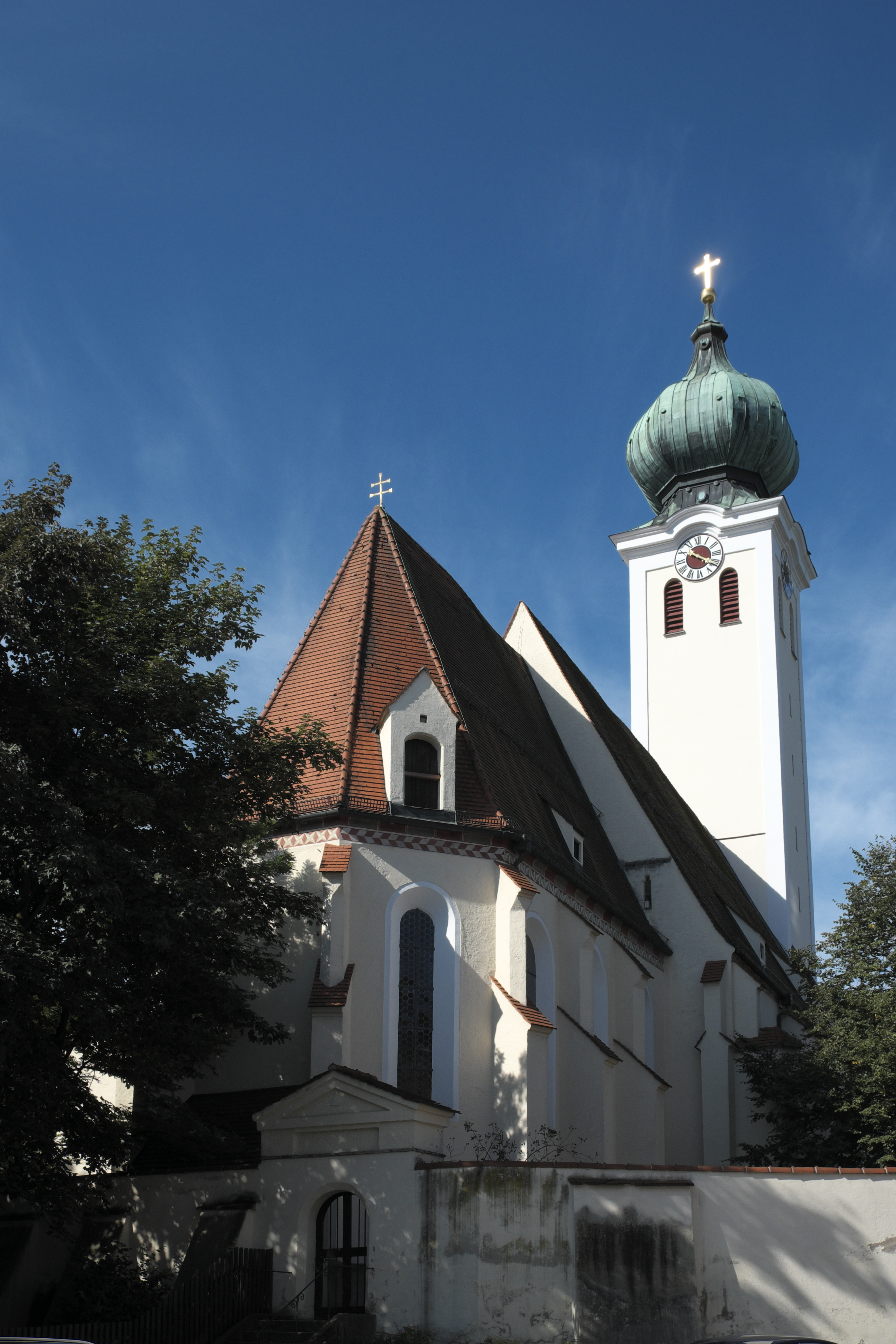 Katholische Pfarrkirche St. Maria in Ramersdorf im Stadtbezirk Ramersdorf-Perlach in München (Bayern/Deutschland)